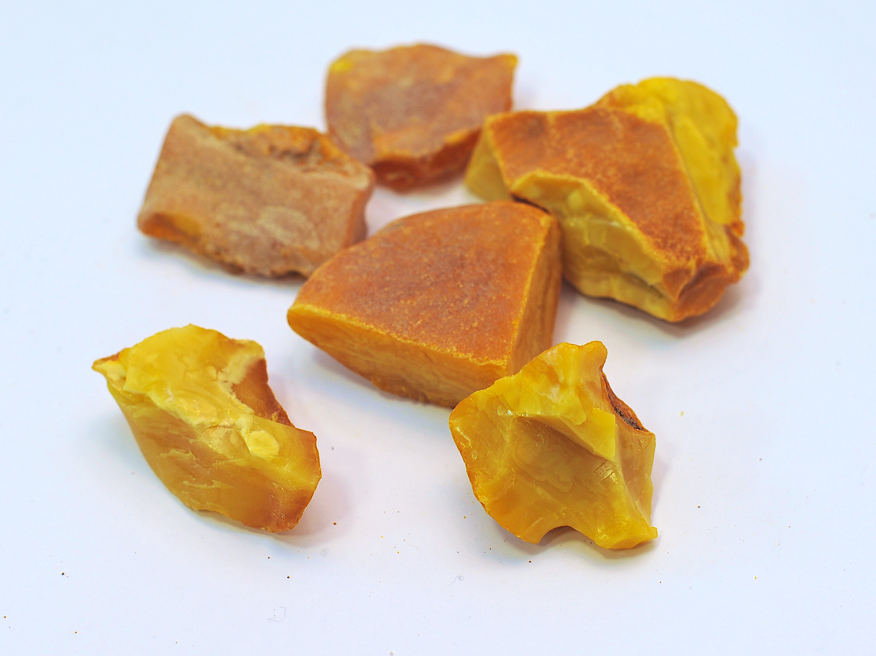 Застывшая смола возрастом 50 млн лет (балтийский янтарь поделочный 5-15 гр - длина 25-30 мм). Из коллекции демонстрационного зала Калининградского янтарного комбината.